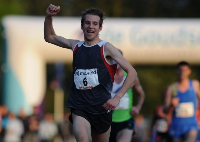 Patrick Stitzinger during NK 10.000 m